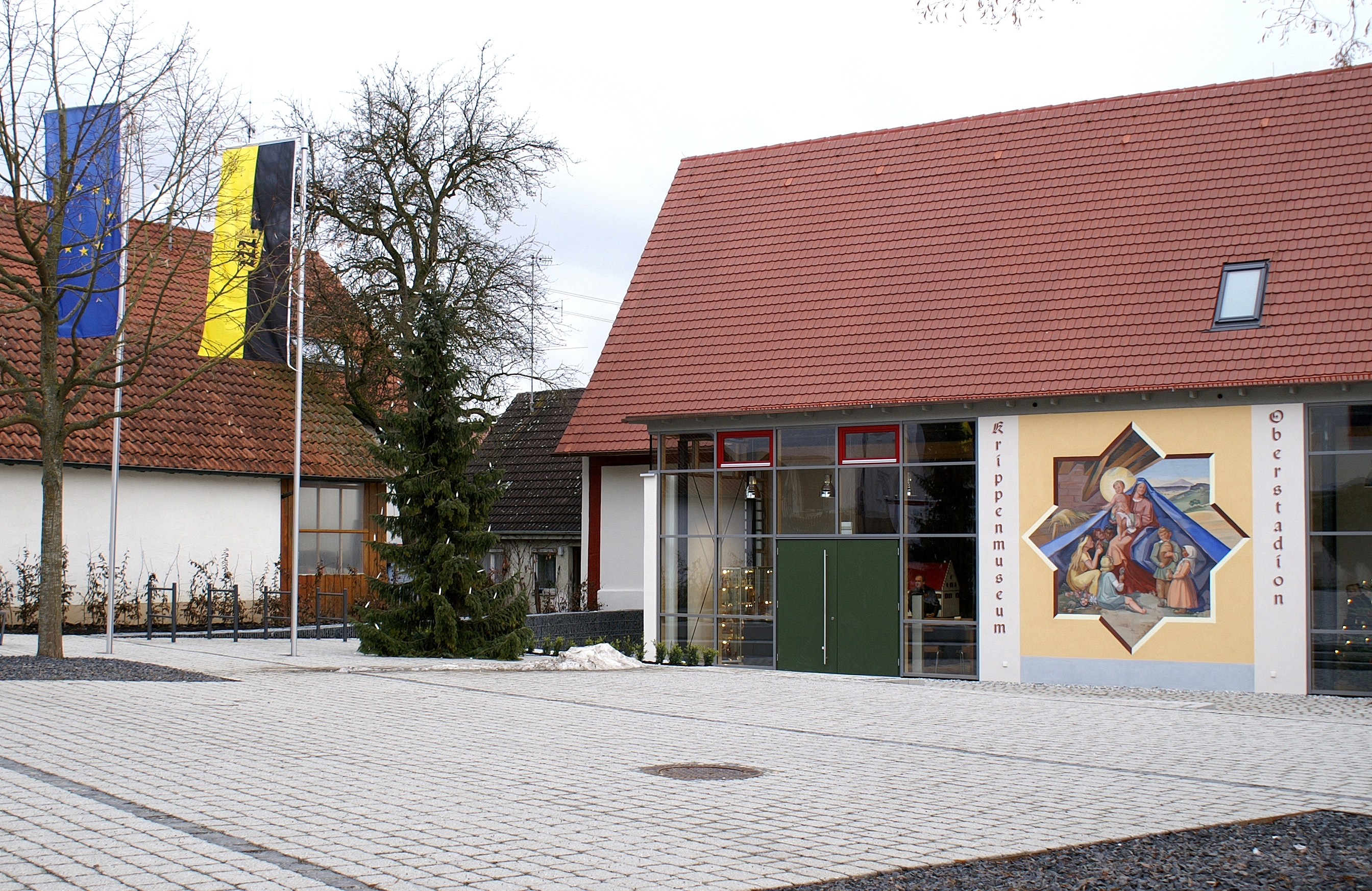 Das Krippenmuseum in Oberstadion befindet sich in der denkmalgeschützten Pfarrscheune aus dem Jahr 1612